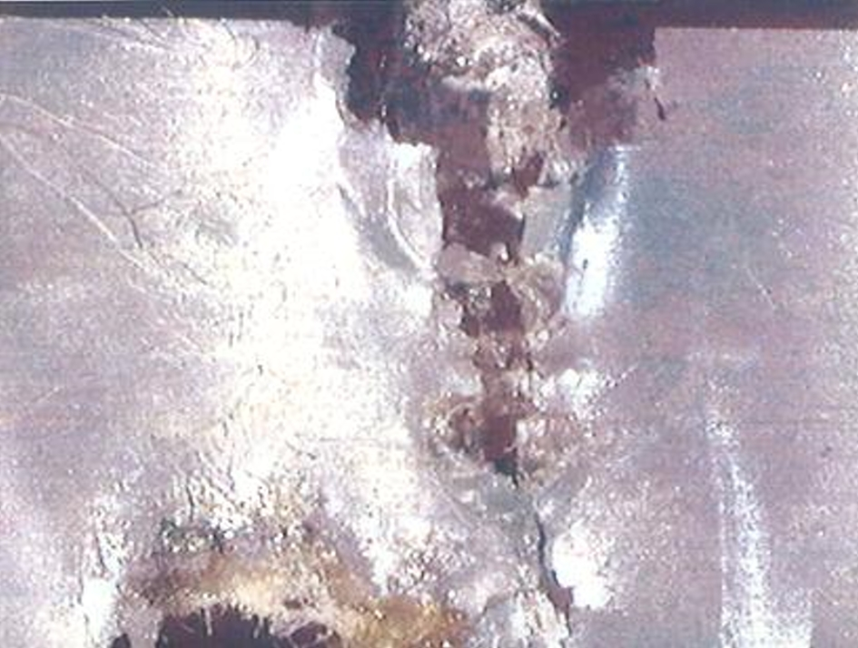 typisches Erscheinungsbild einer Chlor-Korrosion in einem Aluminium-Elko mit flüssigem Elektrolyten